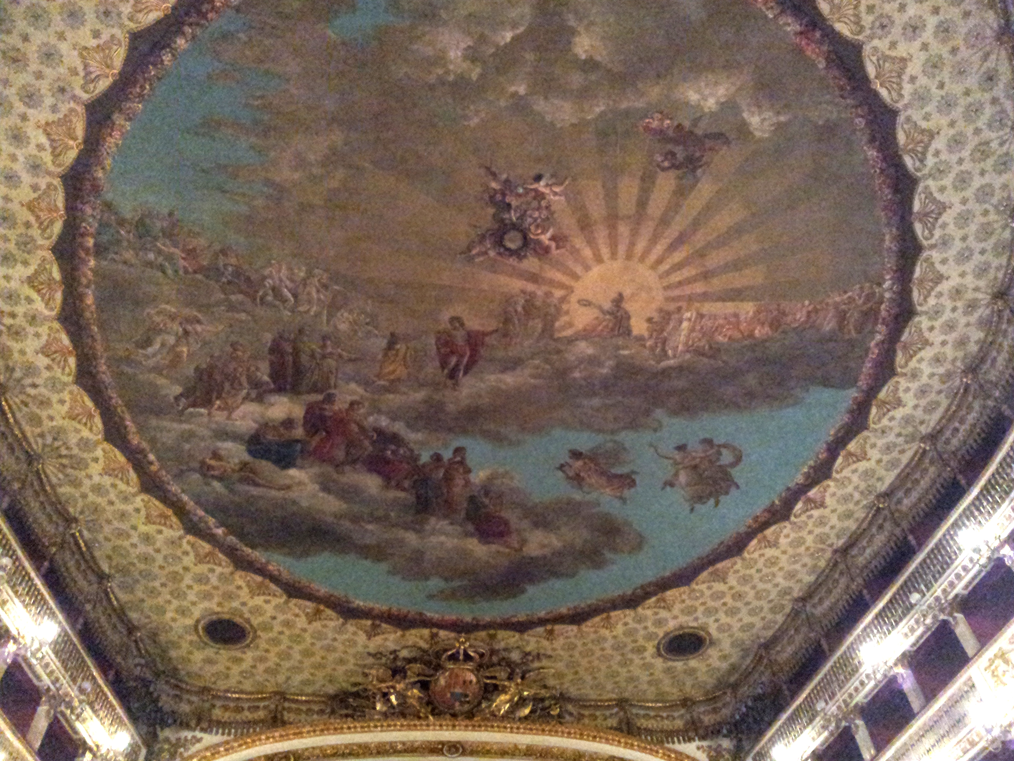 La grande tela sul soffitto del Real Teatro di San Carlo di Napoli. Apollo che presenta a Minerva i più grandi poeti del mondo, (1824 ca.). Opera di 500 metri quadrati di Antonio, Giovanni e Giuseppe Cammarano.